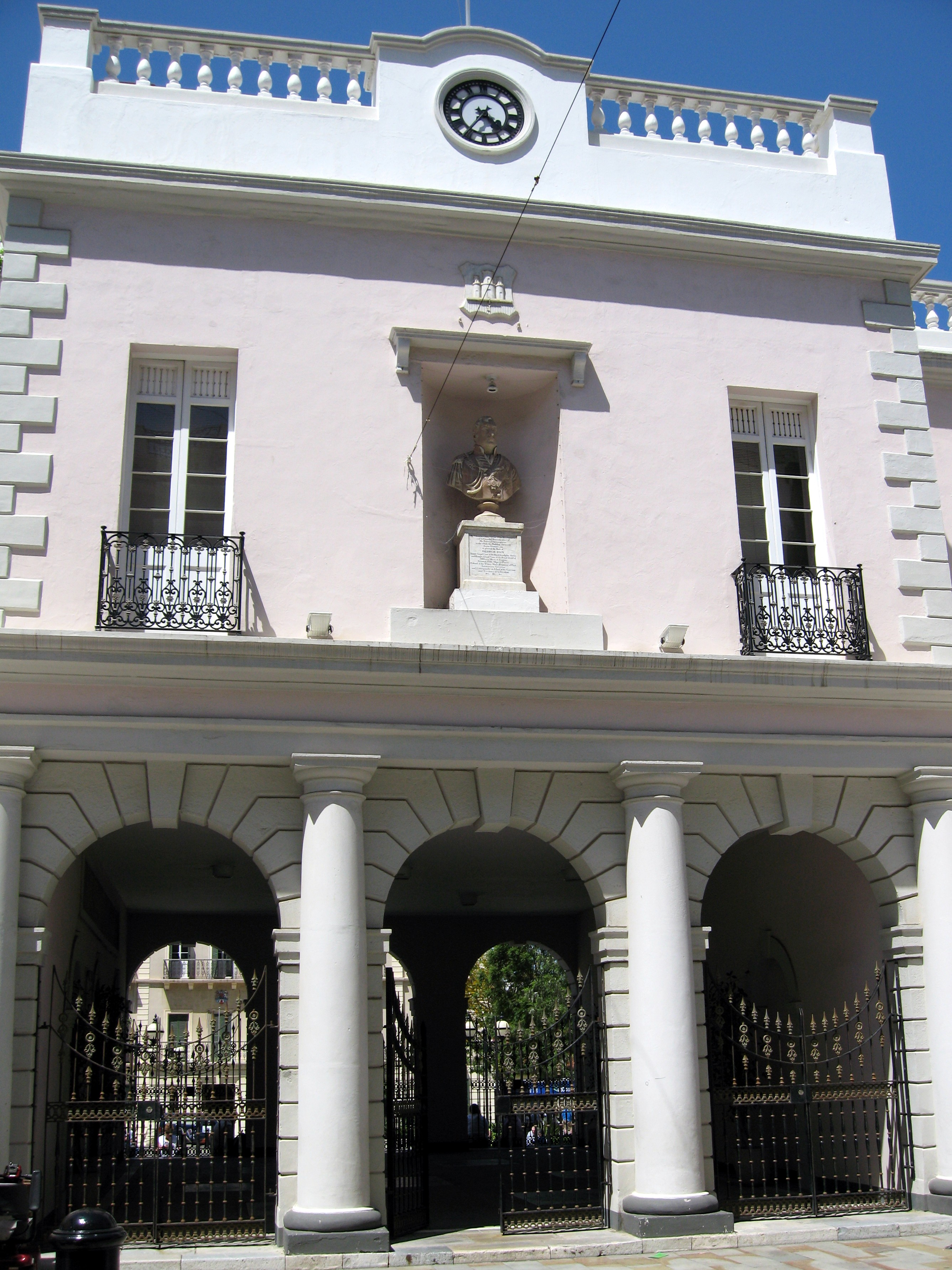 Gebäude des Parlaments von Gibraltar (House of Assembly) zwischen der Hauptstraße (Main Street) und dem John-Mackintosh-Platz (John Mackintosh Square)